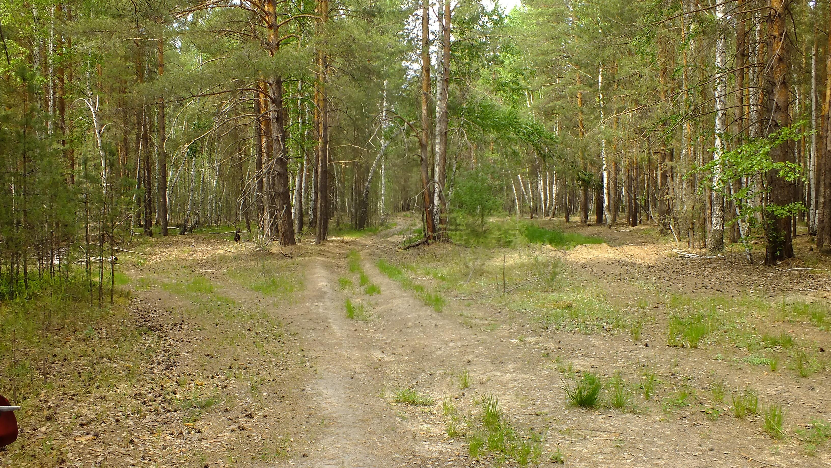 Дорога на лесной просеке